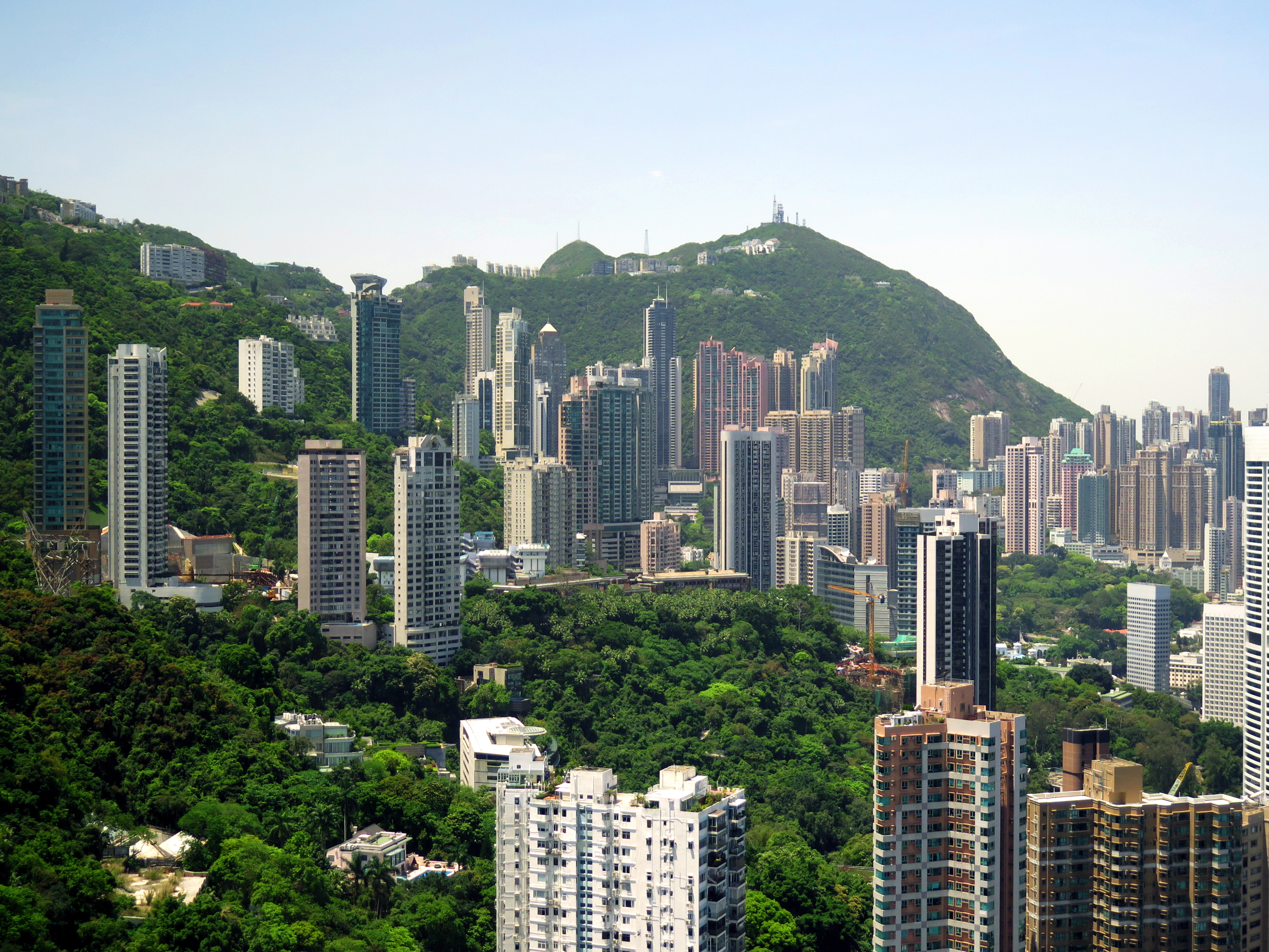 Middle Hill Residentional